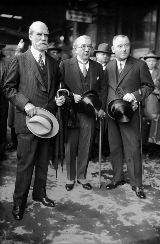 Ankunft des amerikanischen Staatsekretärs Hughes, auf dem Bahnhof Friedrichstrasse in Berlin. v.li.n.re.: Staatssekretär Hughes, der amerik. Botschafter Houghton und der deutsche Staatssekretär des Auswärtigen von Malzan [A.G.O. Maltzan].